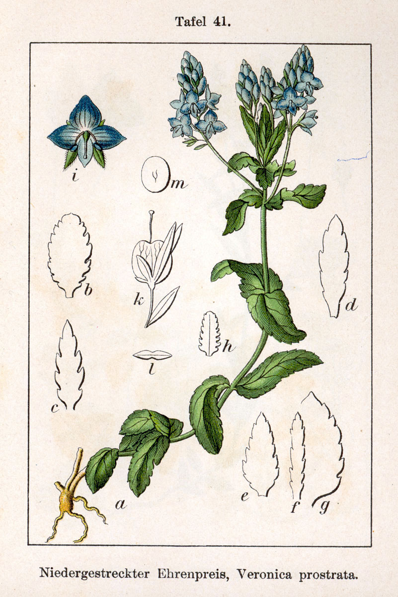 Veronica prostrata L. s. l. Original Description Niedergestreckter Ehrenpreis, Veronica prostrata